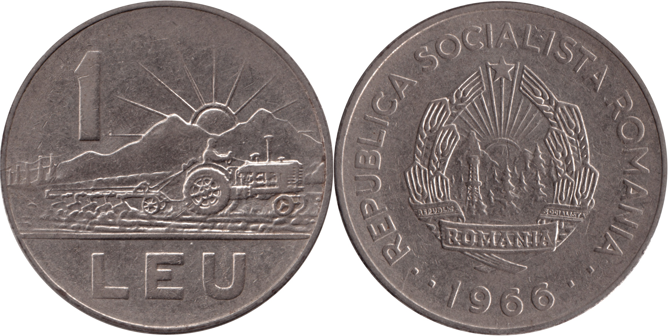 Romanian coin: 1 leu1966